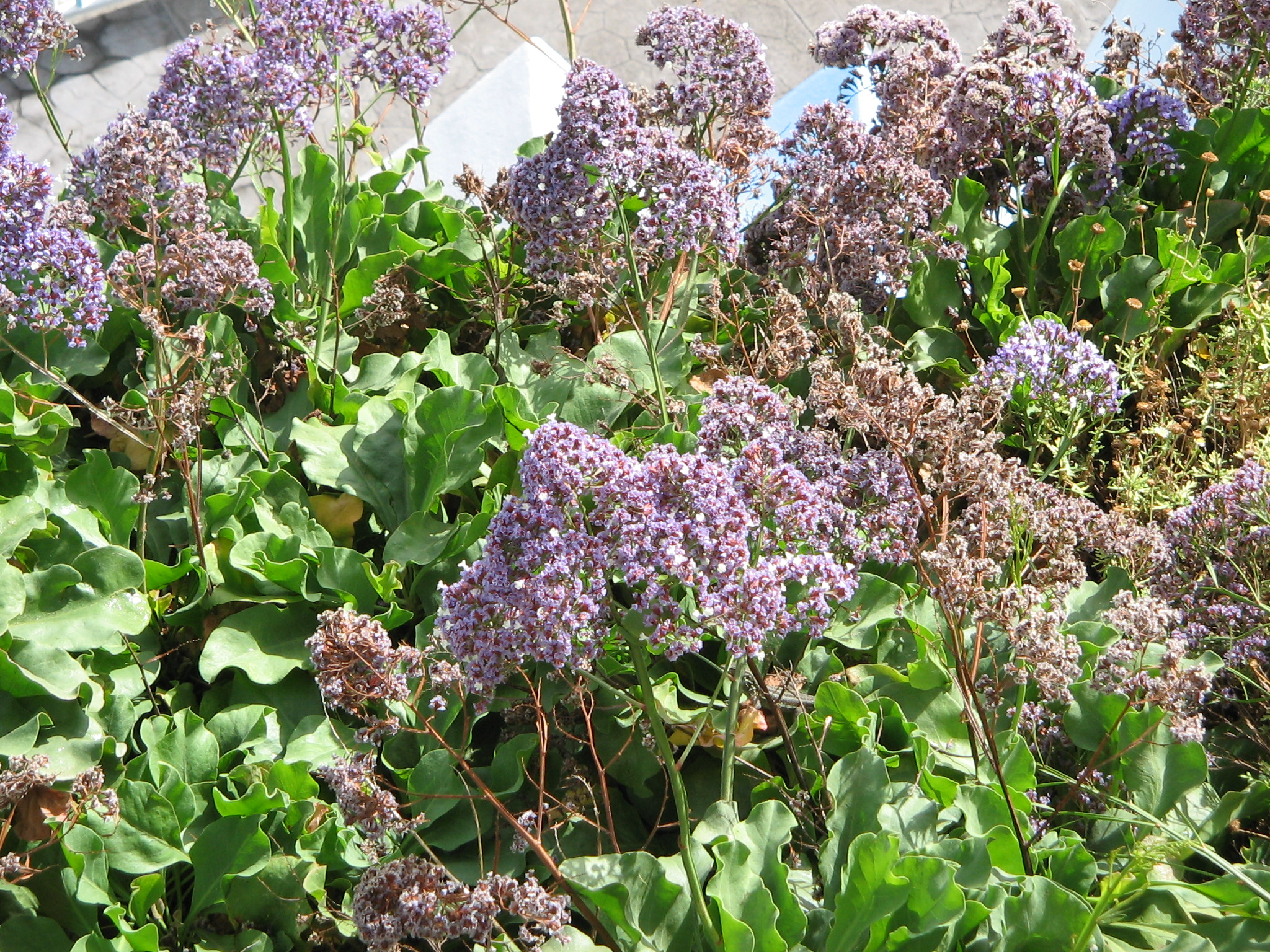 Détail de la photo File:Limonium fruticans1.jpg